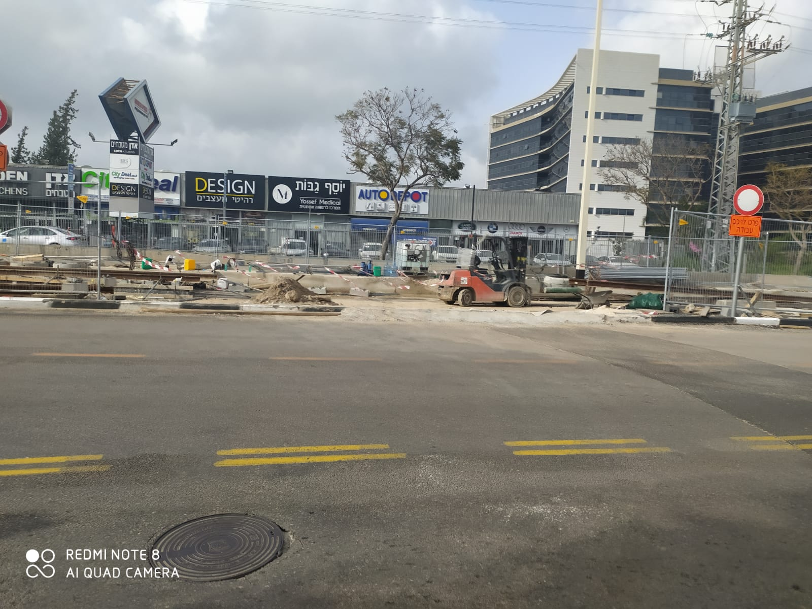 עבודות הקו האדום